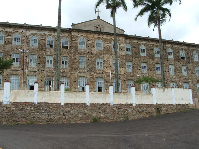 Mosteiro dos Jesuítas. Abaixo podemos ver a Cidade de Baturité. Antes uma escola religiosa. A presente vista seria de quem estivesse na parte mais baixa, pelo lado da cidade de Baturité; isso se a vista alcançasse.